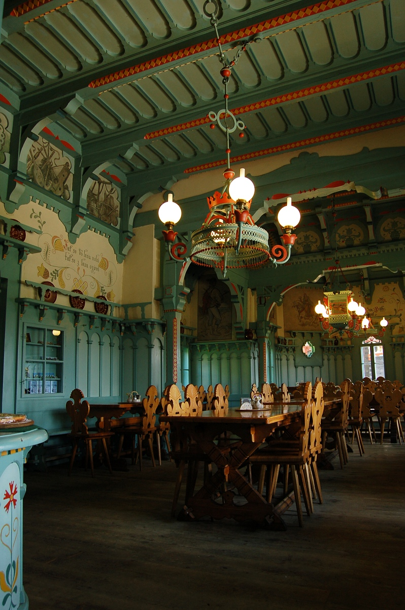 Pustevny, Maměnka - interiér, fotografováno 11.6.2006